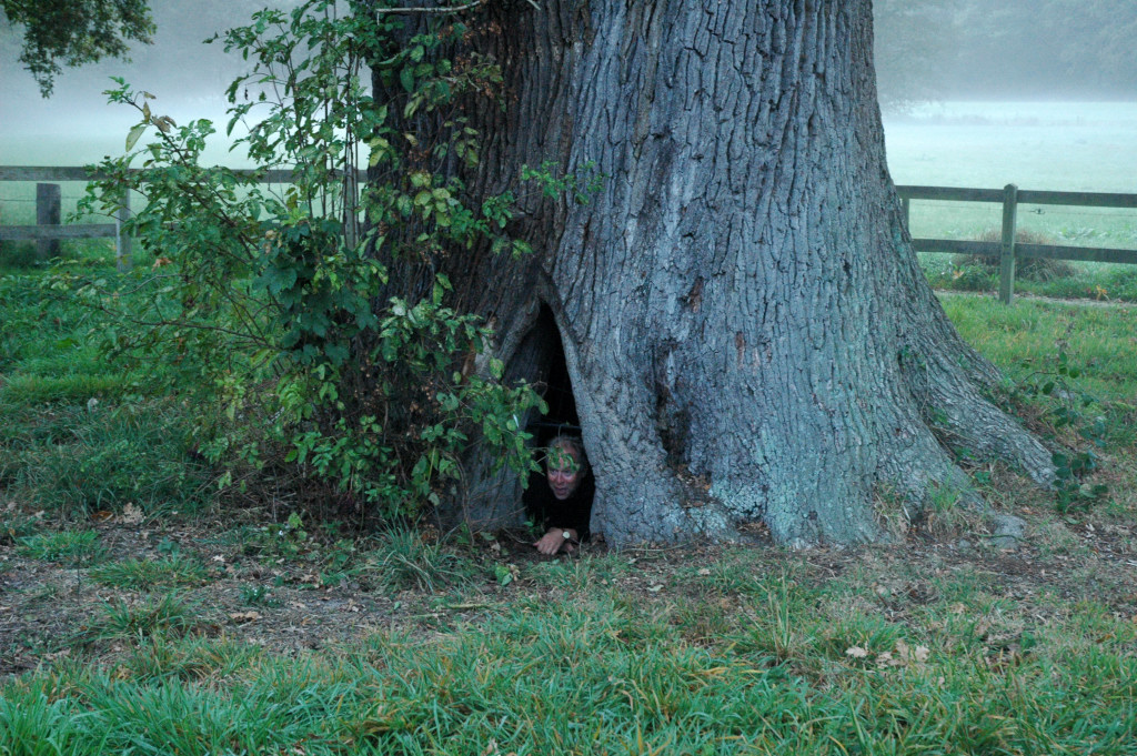 Dikke Boom (big tree), largest tree in the Netherlands.